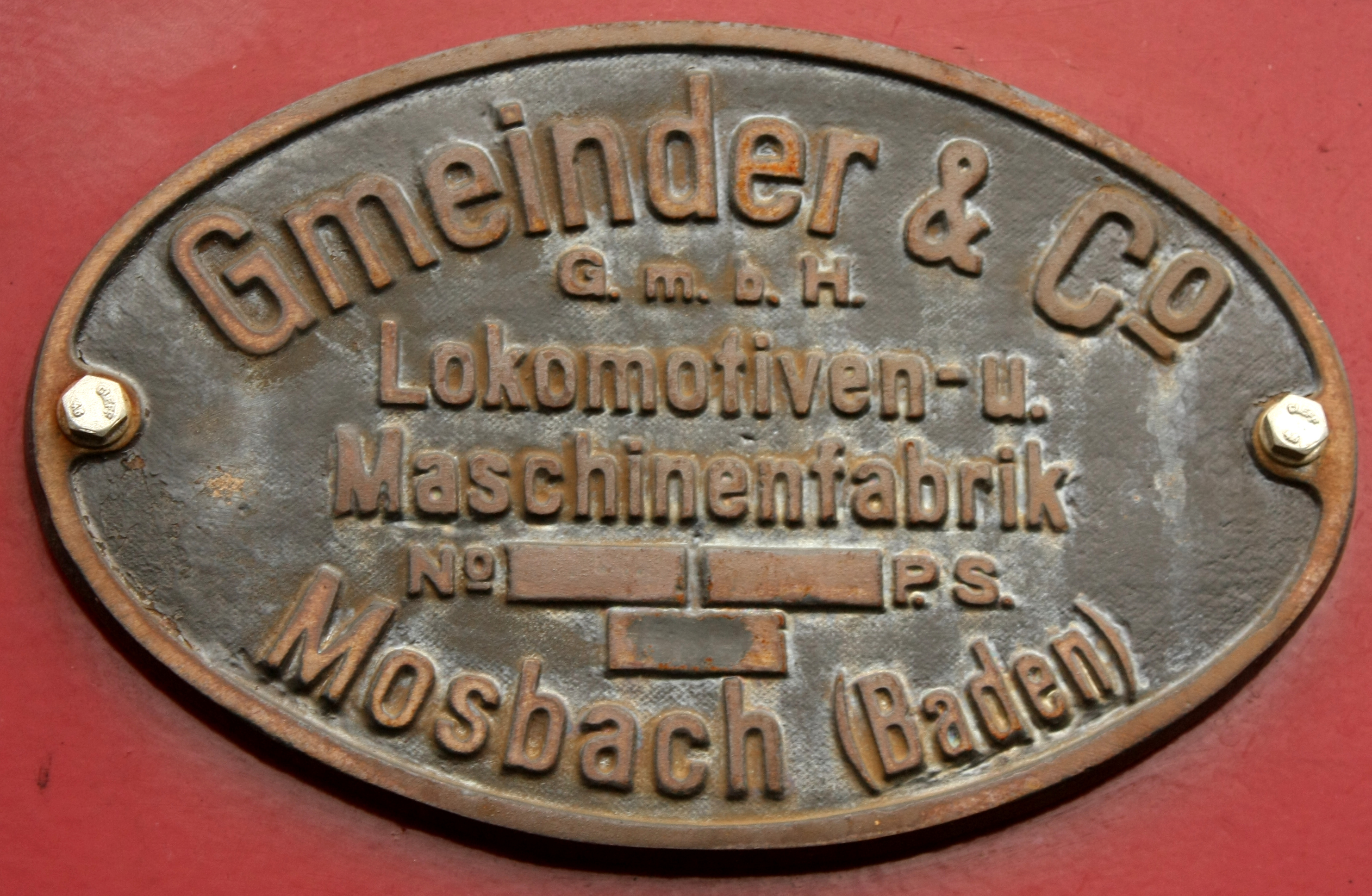 Firmenschild der Lokomotivfabrik Gmeinder